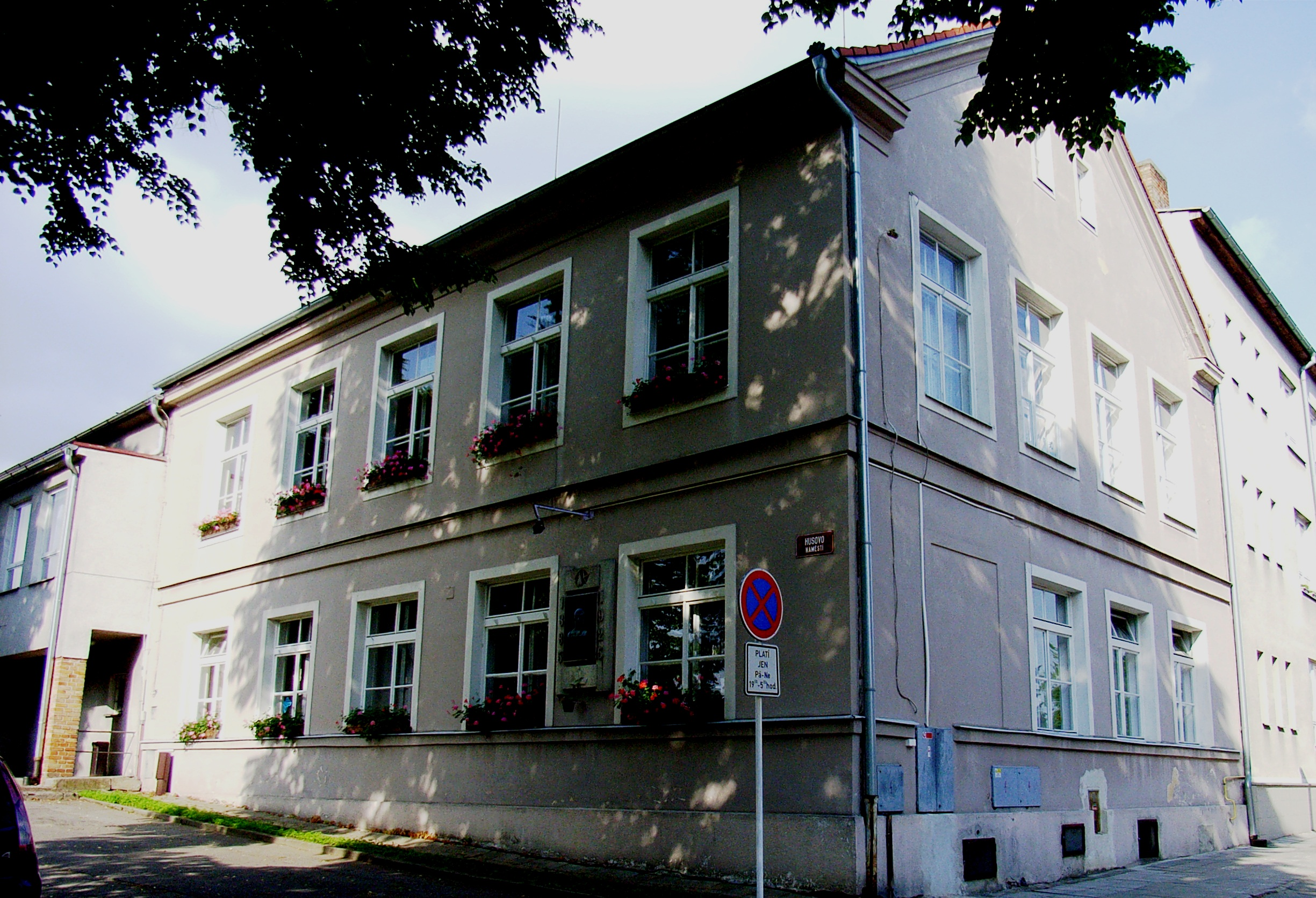 Sezimovo Ústí - náměstí, dům s pamětní deskou Josefa Švehly